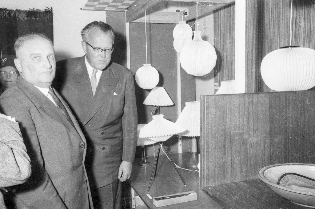 im Lichtspiel-Theater Tivoli in der Holtenauer Straße 103. Eröffnung. Im Bild u.a. Bürgermeister Herbert Fuchs. (1.v.l.).